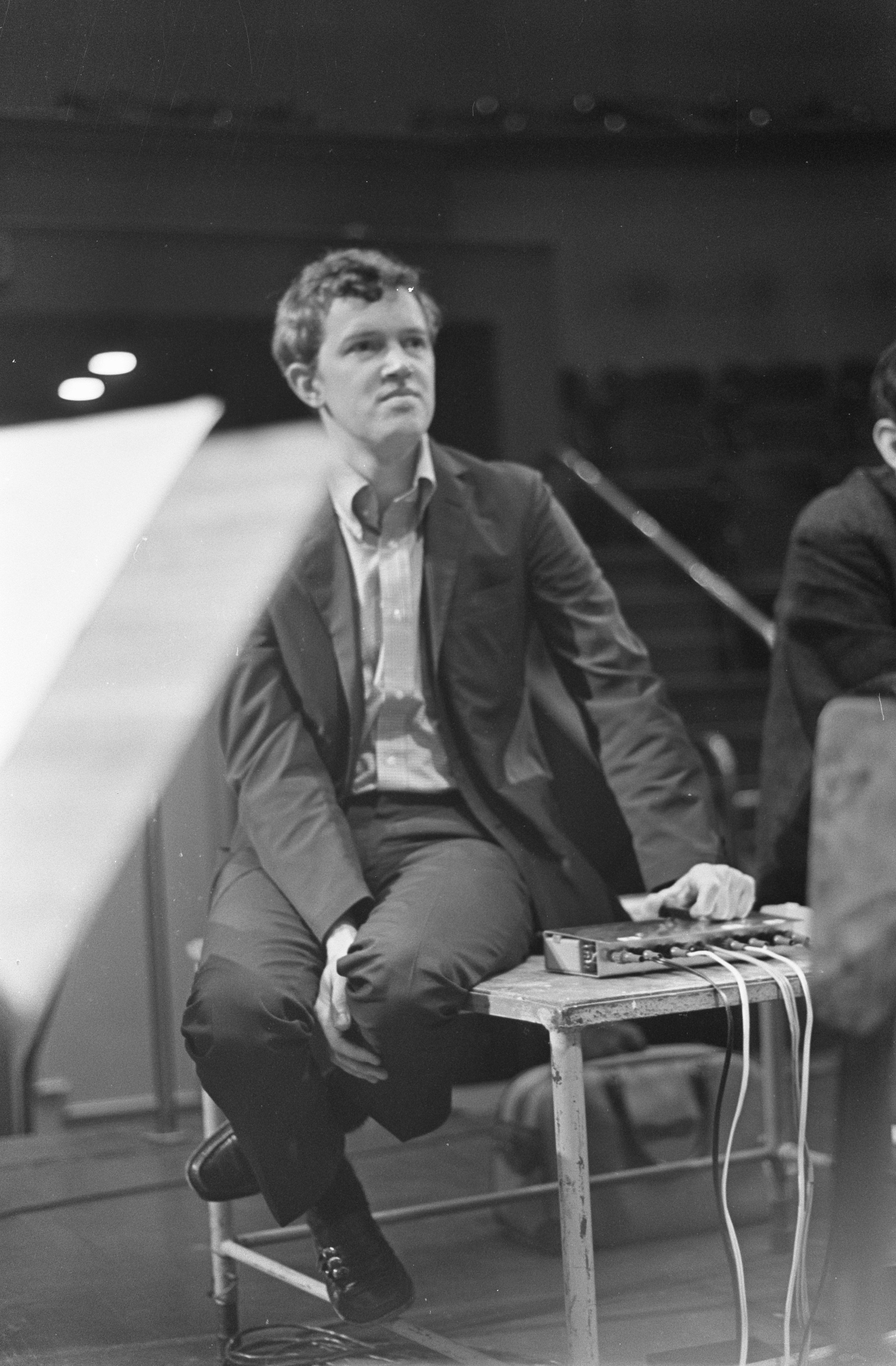 Collectie / Archief : Fotocollectie Anefo Reportage / Serie : [ onbekend ] Beschrijving : Concert in Carre. Edo de Waart (dirigent) dirigeert de musici met schakelaar Datum : 30 mei 1968 Trefwoorden : MUSICI, concerten, dirigenten Persoonsnaam : Edo De Waart Instellingsnaam : Carré Fotograaf : Kroon, Ron / Anefo Auteursrechthebbende : Nationaal Archief Materiaalsoort : Negatief (zwart/wit) Nummer archiefinventaris : bekijk toegang 2.24.01.05 Bestanddeelnummer : 921-4030